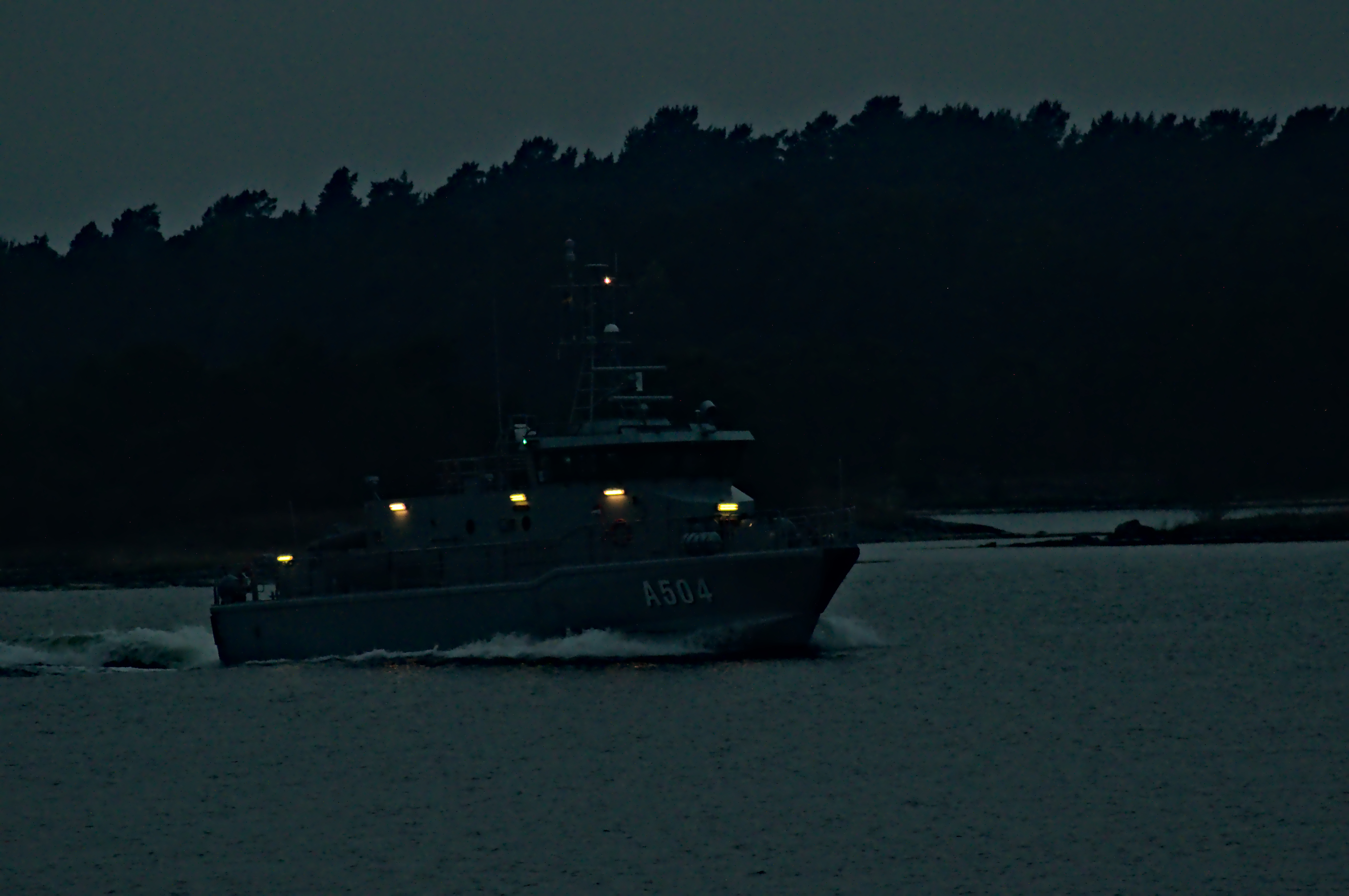 HMS Argo utanför Ornö i augusti 2015.